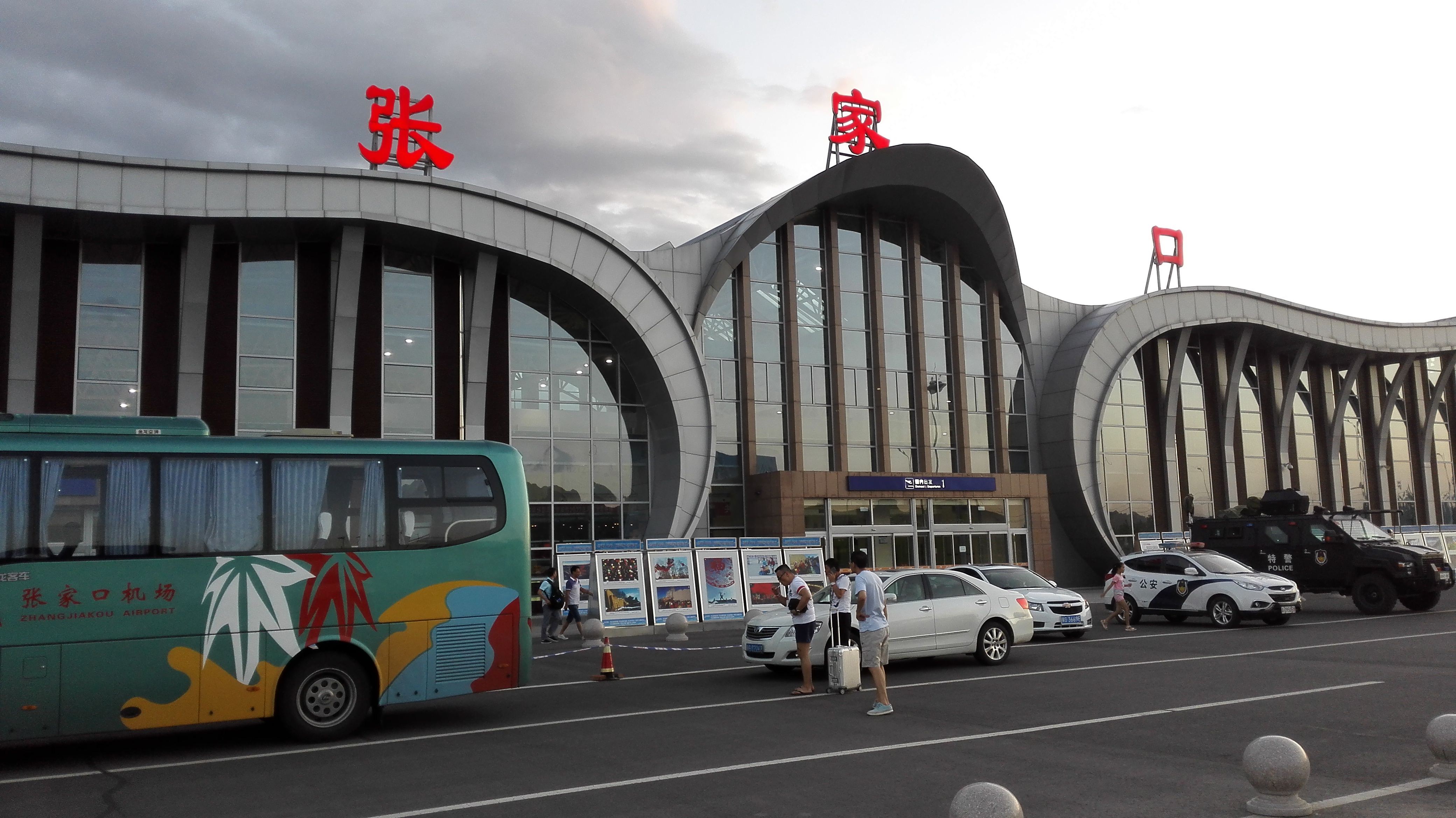 张家口宁远机场，拍摄于2015年8月20日。